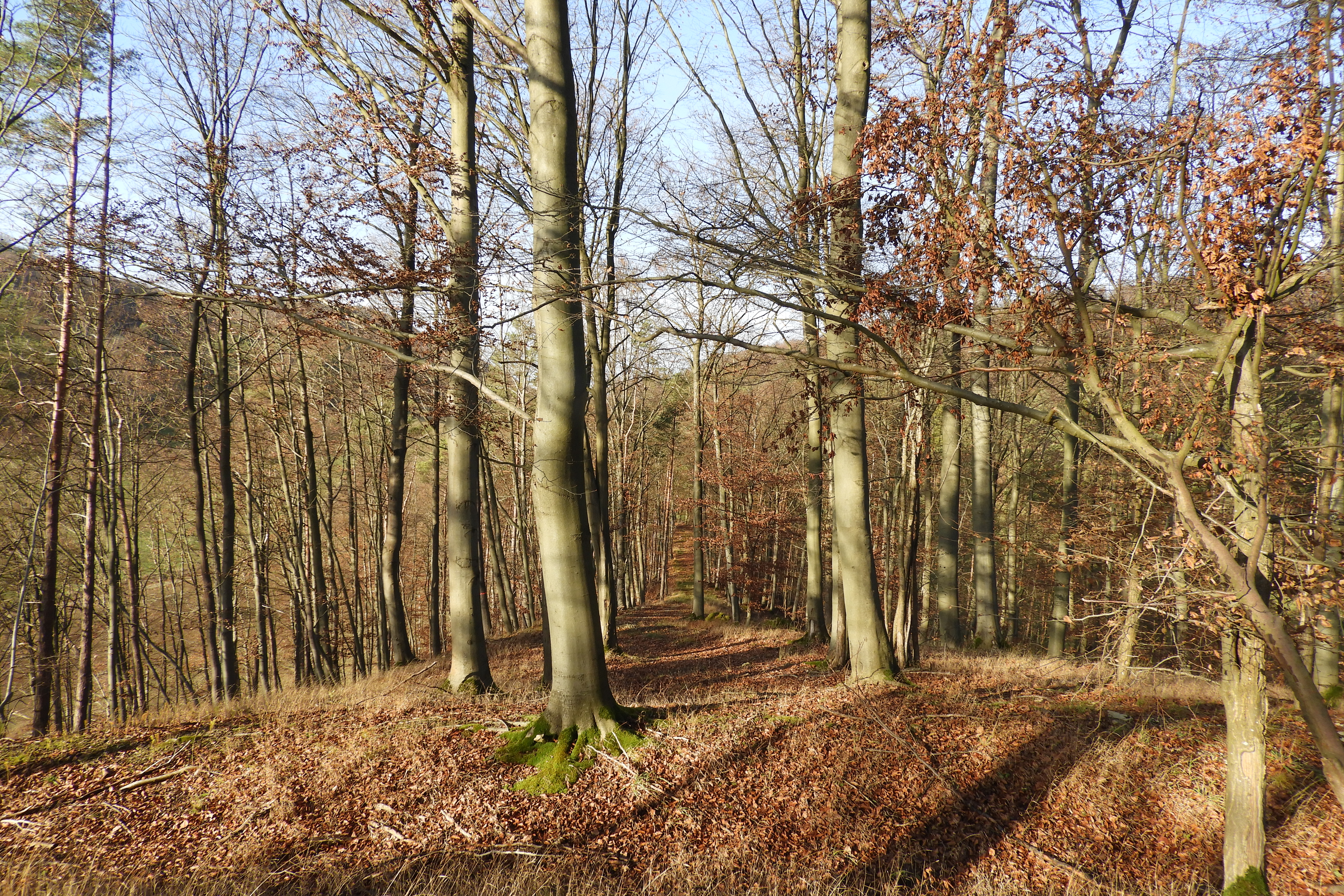 Der „Taubenberg“ liegt mit einer Höhe von 340 m im mittleren Ulfetal, in der Gemarkung von Breitau, einem Ortsteil Sontras, im nordhessischen Werra-Meißner-Kreis. Auf seiner Kuppe finden sich Überreste einer langgestreckten, rechteckigen Burganlage, von der heute nur noch verflachte Wälle und Gräben erhalten sind. Die dort geborgenen Keramikscherben werden in das 12. und 13. Jahrhundert datiert. Über die Erbauer und die Entstehungszeit ist nichts bekannt, es fehlen jegliche zeitgenössischen Zeugnisse.